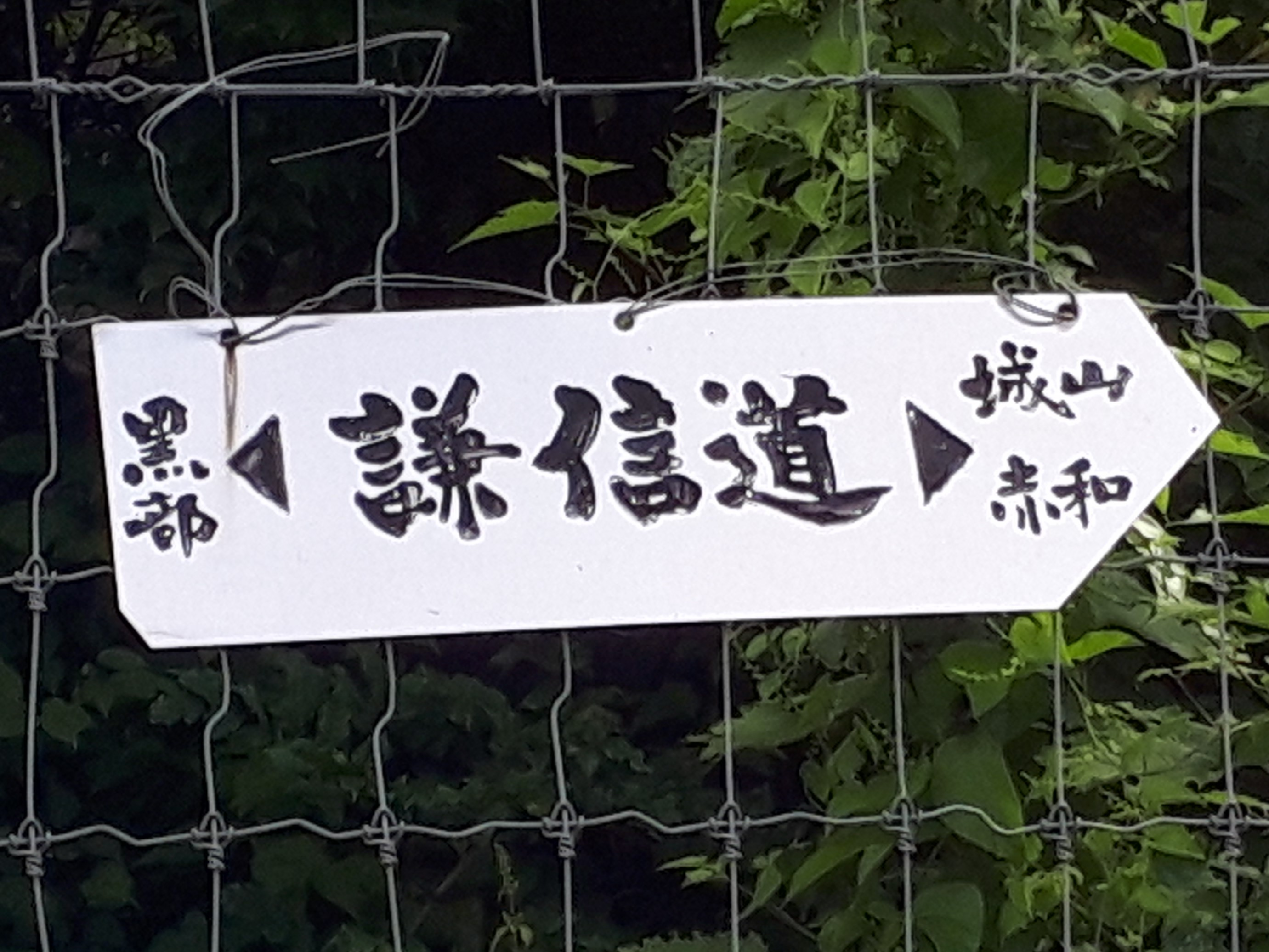 上杉謙信が川中島合戦のとき使ったとの伝承が残る長野県高山村にある謙信道の看板。